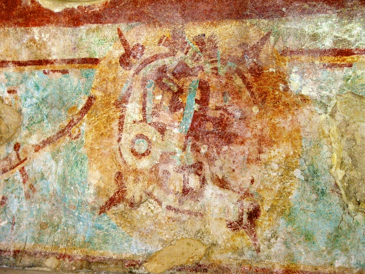 Este mural se encuentra en la Sala de los Frescos en la zona arqueológica de Mayapán. En él aparece un disco solar con la figura de una deidad, posiblemente representando uno de los tránsito de Venus que ocurrieron en los años 1152 o 1275.